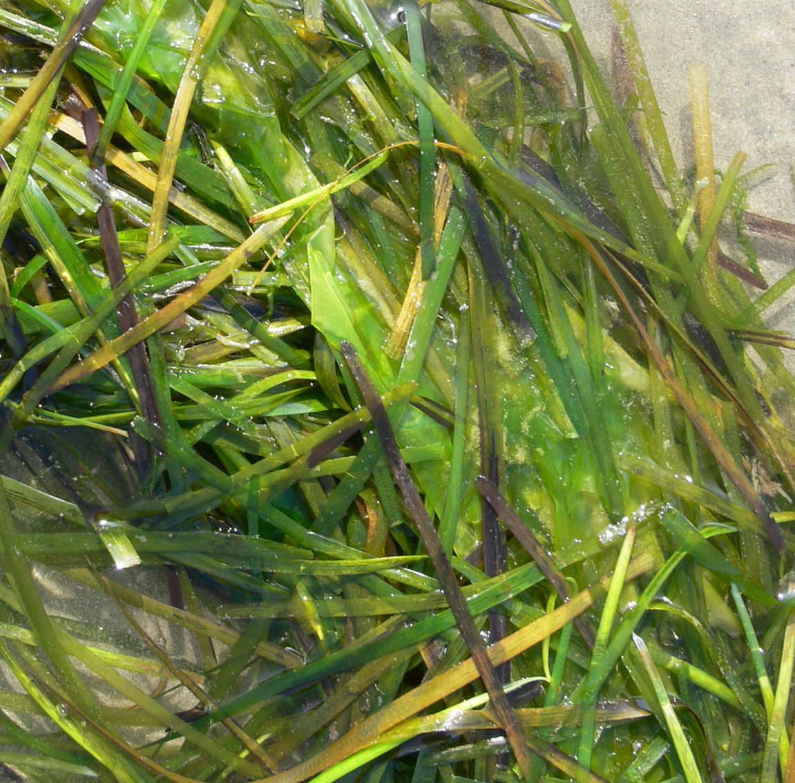 Les laisses de mer contiennent habituellement essentiellement des algues. Ici, sur la plage de morgat, près des reliques d'un grand herbier en partie détruit par deux extentions successive du port, la laisse de mer est essentiellement constituée de Zostères, qui est une plante à fleur marine, proche de la Posidonie (qui vit dans les eaux plus chaudes) et non une algue. Les communes littorales ont pris l'habitude de nettoyer les laisses de mer. Du point de vue du développement soutenable, quand elles ne sont ni dangereuses ni polluées, il conviendrait de préserver la partie naturelle des laisses de mer, tout particulièrement aux pieds des dunes et sur le haut des plages qu'elles contribuent à fixer. Lieu : Morgat, Baie de Douarnez, Finistère, Bretagne, Ouest de la France.